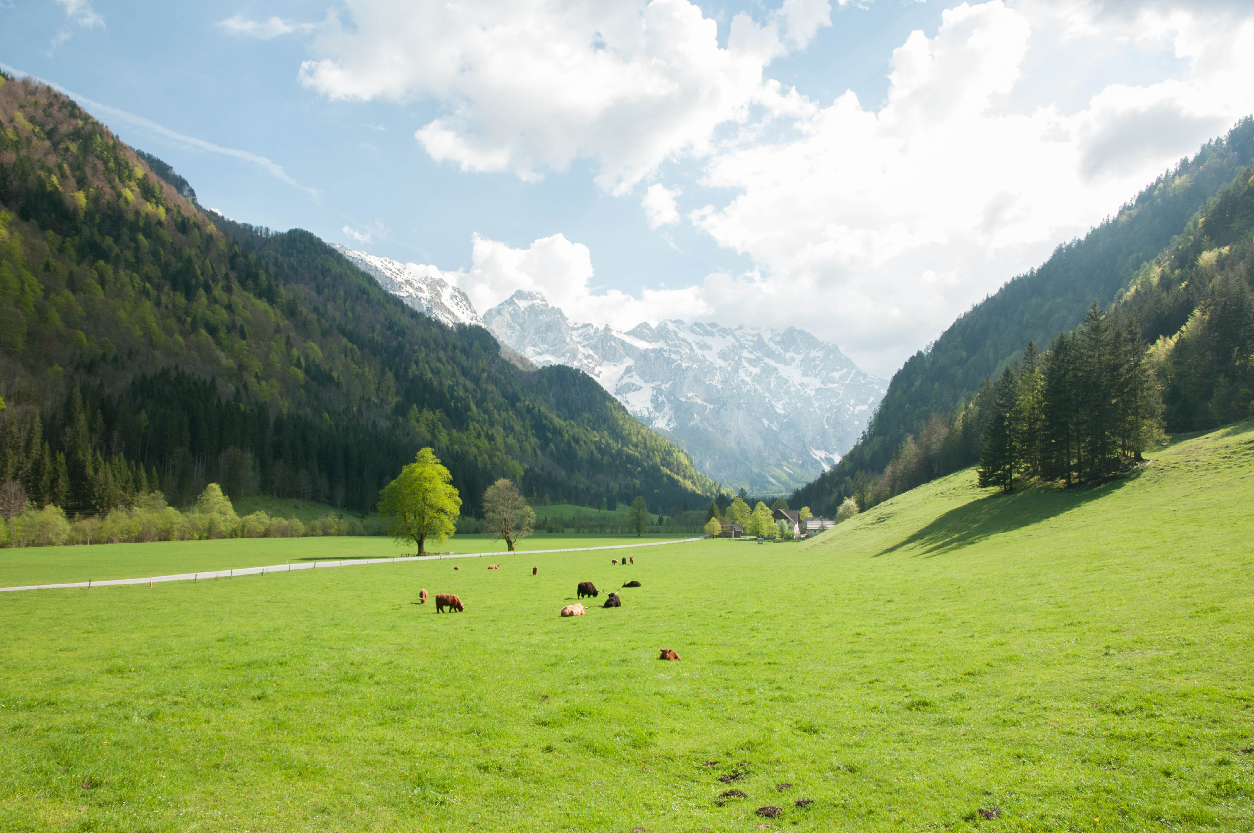 Logar valley, Slovenia